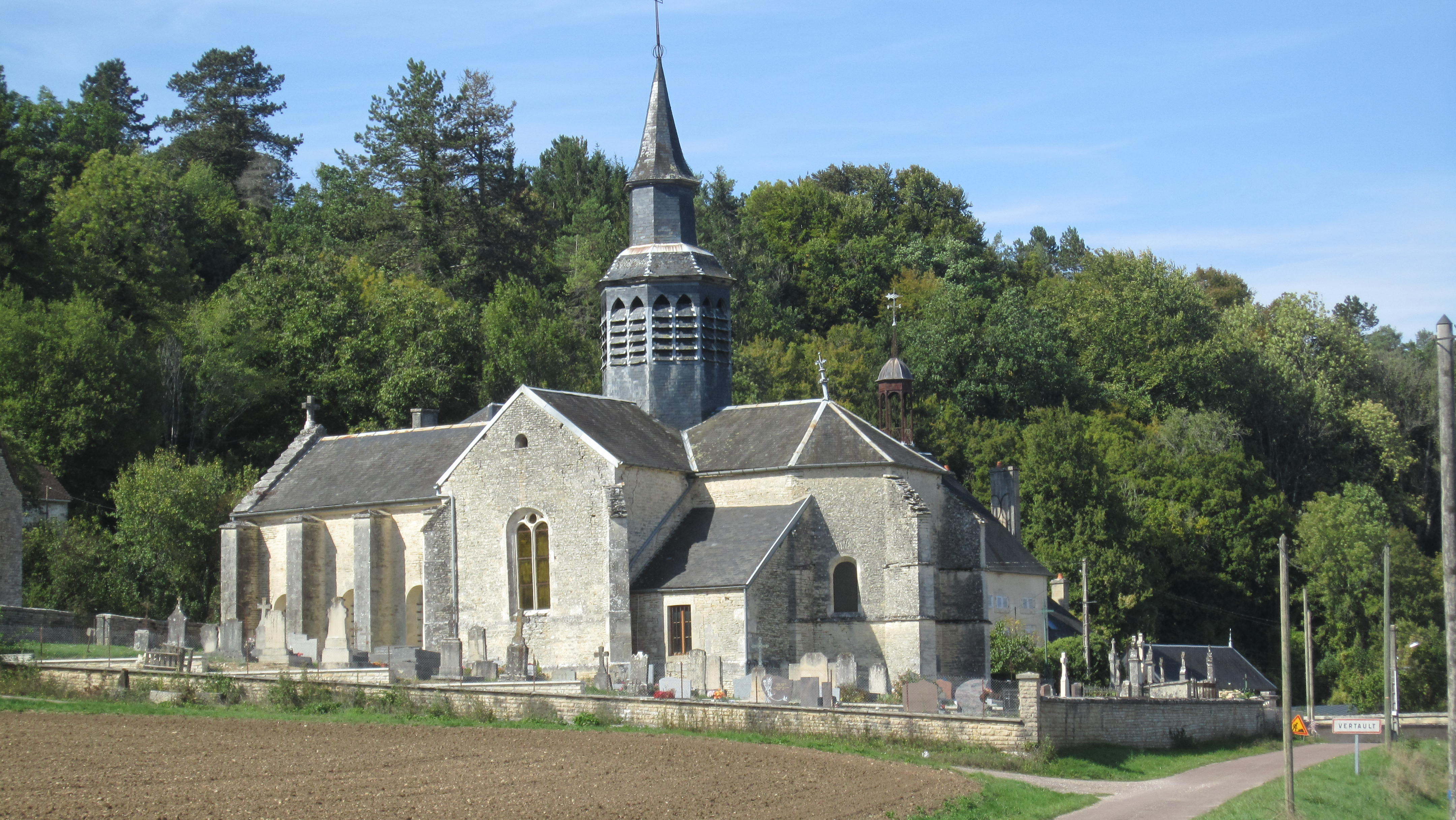 Eglise de Vertault (Côte-d'Or)